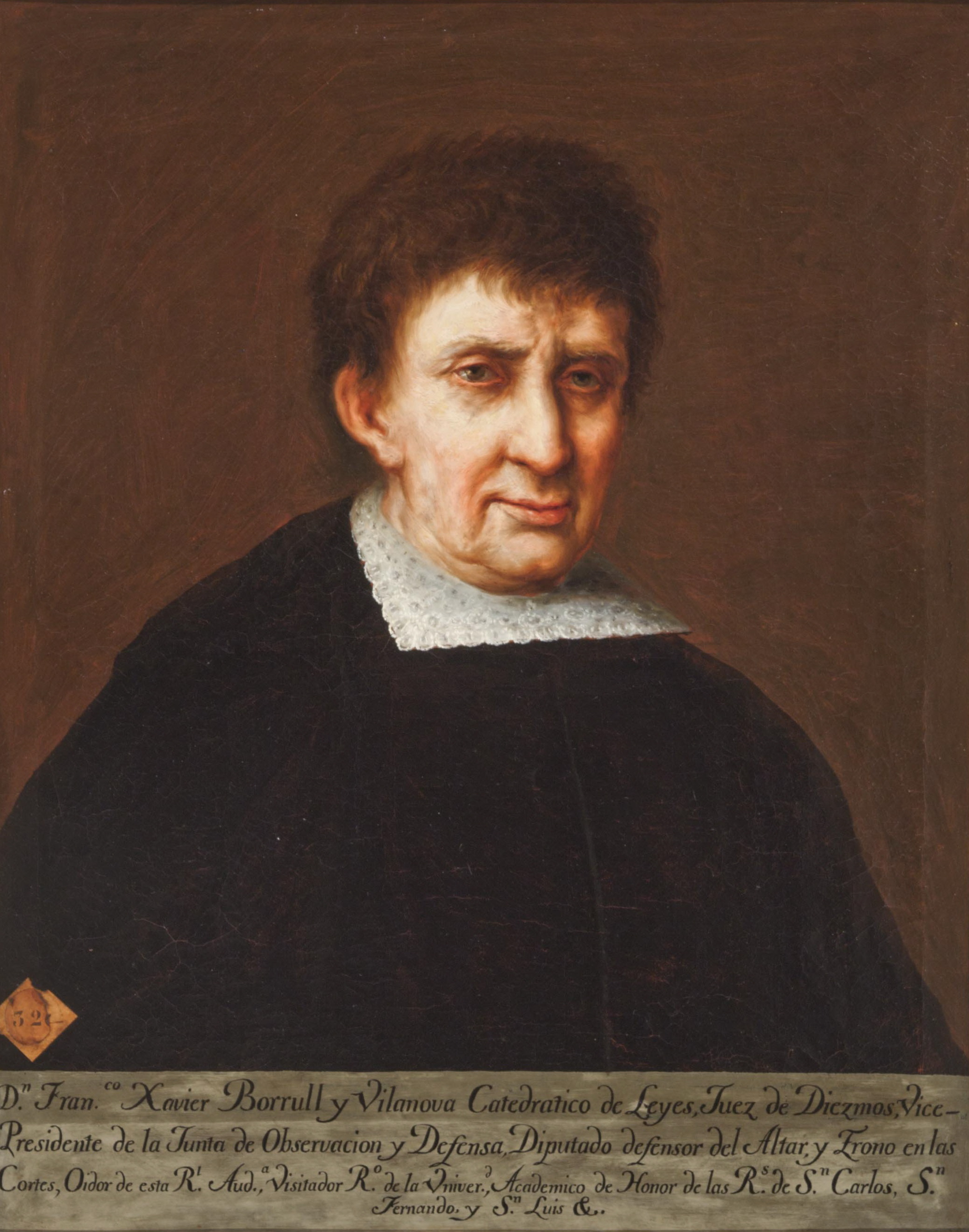 Retrato del politico y jurista español Francisco Javier Borrull (1745-1837), que fue catedrático de Leyes, juez de Diezmos, vicepresidente de la Junta de Observación y defensa, diputado por Valencia en las Cortes de Cádiz, oidor de la Real Audiencia, archivero del reino de Valencia y académico de honor de la Real Academia de Bellas Artes de San Carlos de Valencia y de San Luis de Zaragoza.